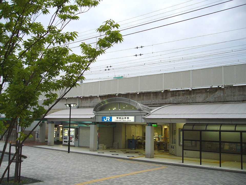 JR西日本甲南山手駅 駅舎（高架北側）